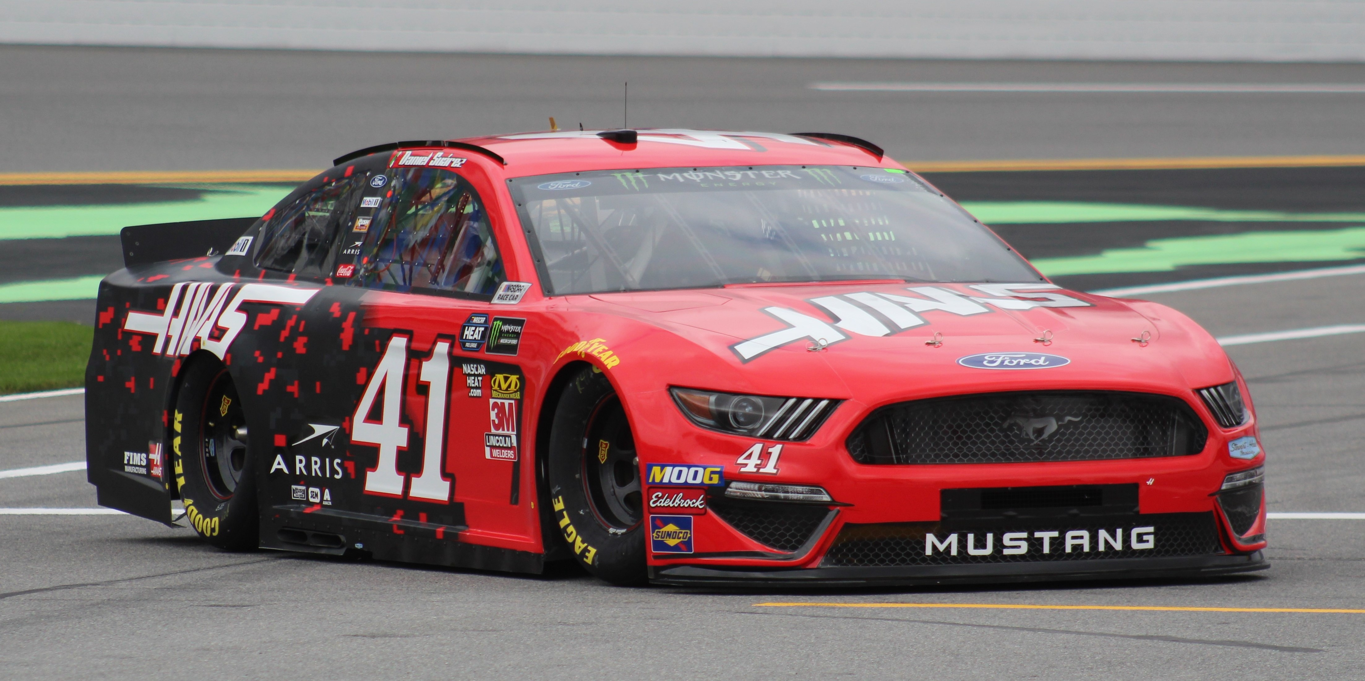 2019 Daytona 500